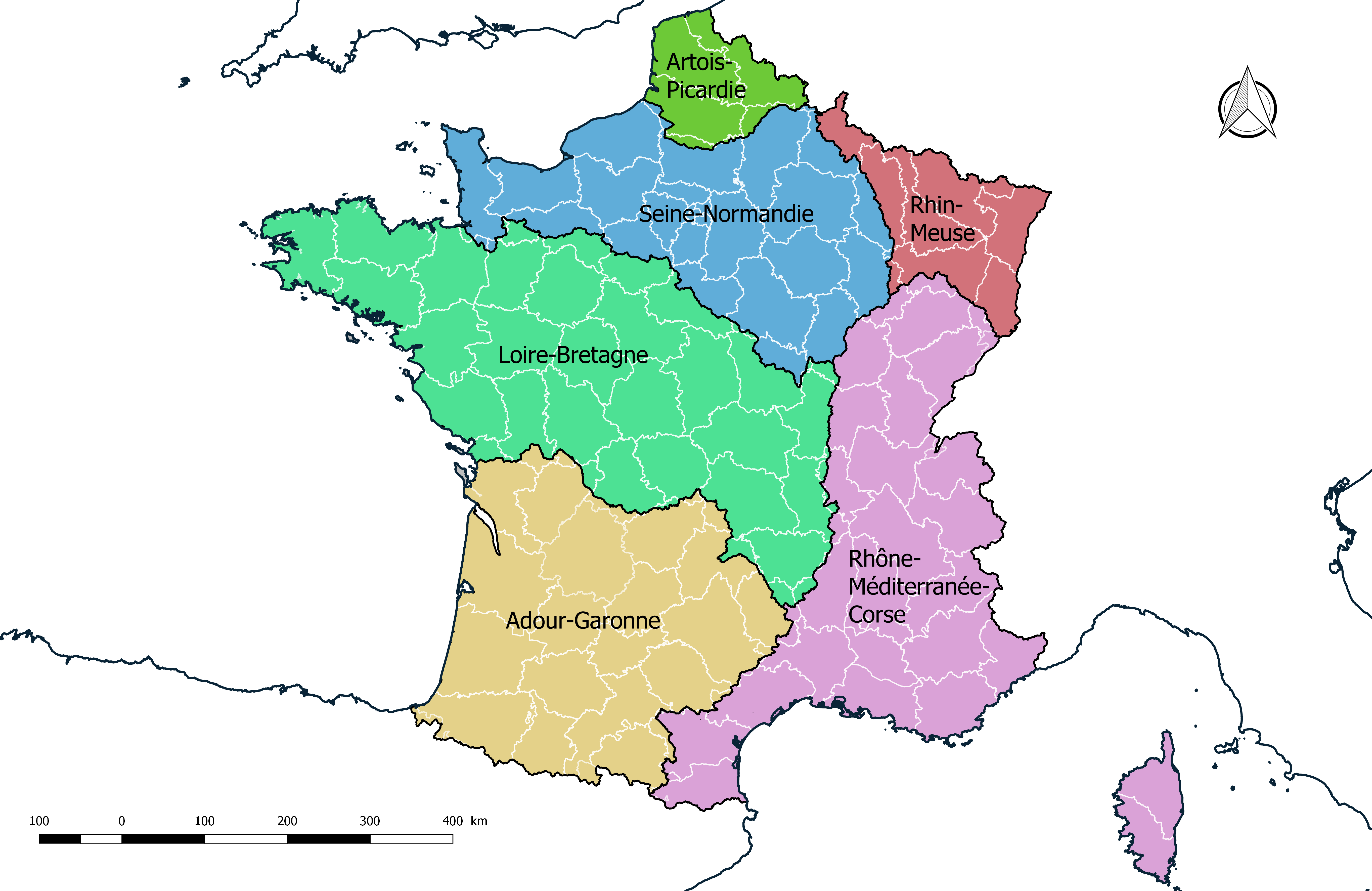 Carte des bassins hydrographiques de la France.